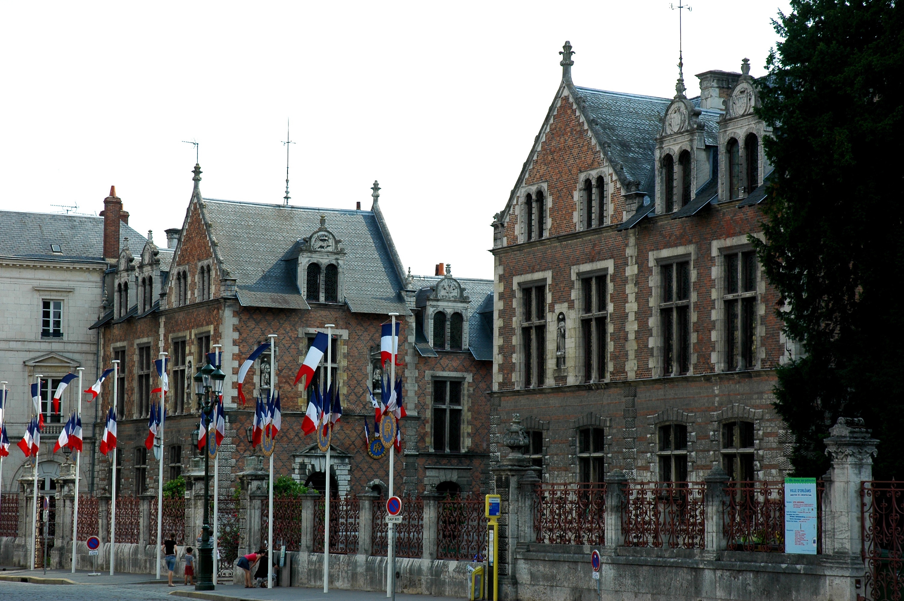 Hôtel Groslot, siège de l'Hôtel de Ville d'Orléans, Loiret, Centre, France. Photographie prise par GIRAUD Patrick.